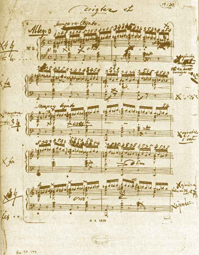 Frédéric Chopins eget manuskript til etyde nr. 2 fra op. 10. Legg merke til fingersettingene; alle sekstendelene skal spilles med høyre lang- (3), ring- (4) og lillefinger (5), for å gjøre dem raskere og uavhengige av hverandre.